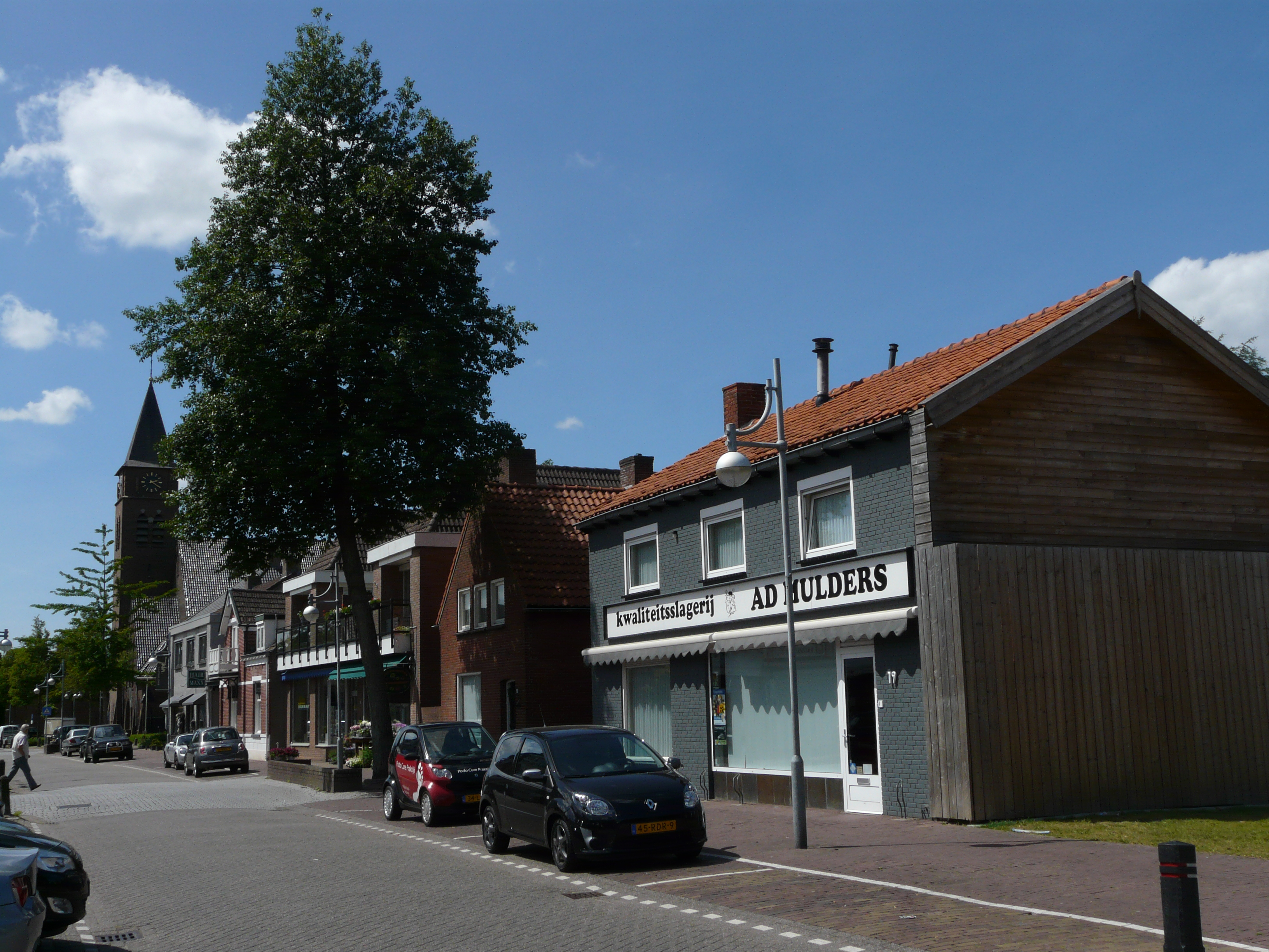 Rucphen